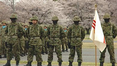 中央即応集団編成完結式に参列。